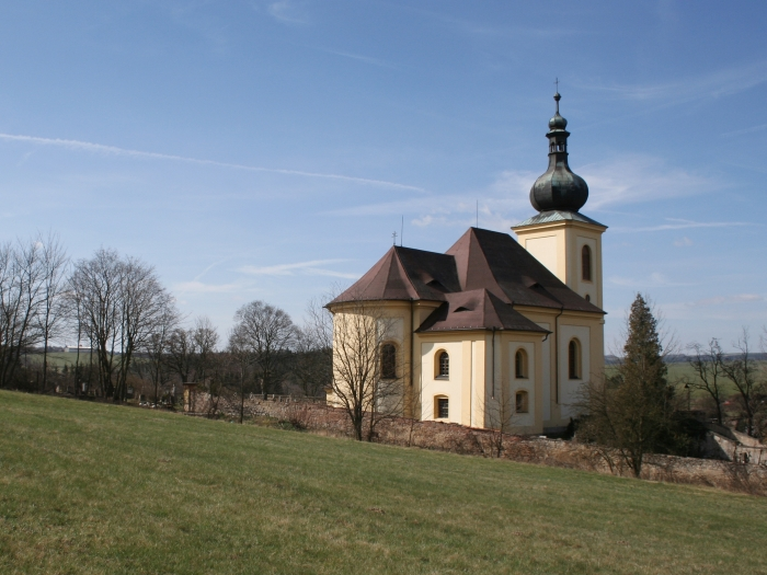 Kostel svatého Jakuba Většího v Nečtinech, Plzeňský kraj, Česká republika. Kostel postaven v gotickém slohu, v 18. století přestavěn.